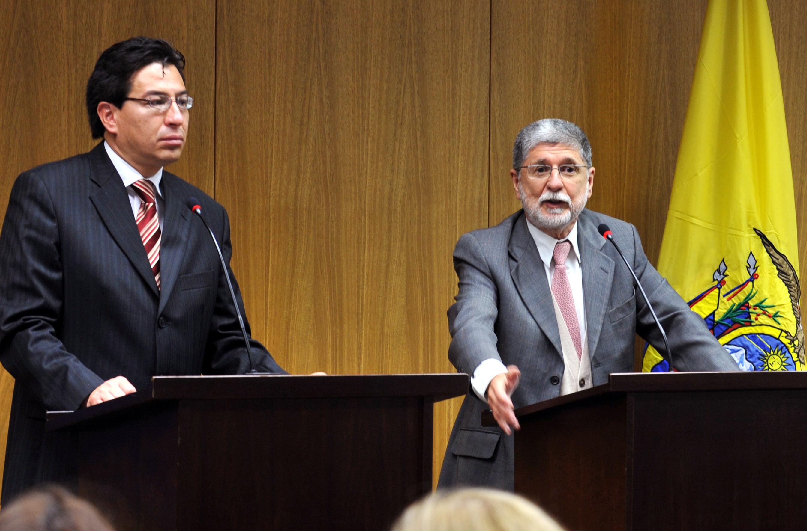 Brasília - Os ministros das Relações Exteriores do Brasil, Celso Amorim, e do Equador, Fander Falconí Benítez, falam sobre a possível instalação de bases norte-americanas em território colombiano, durante entrevista coletiva no Itamaraty Foto: Valter Campanato/ABr